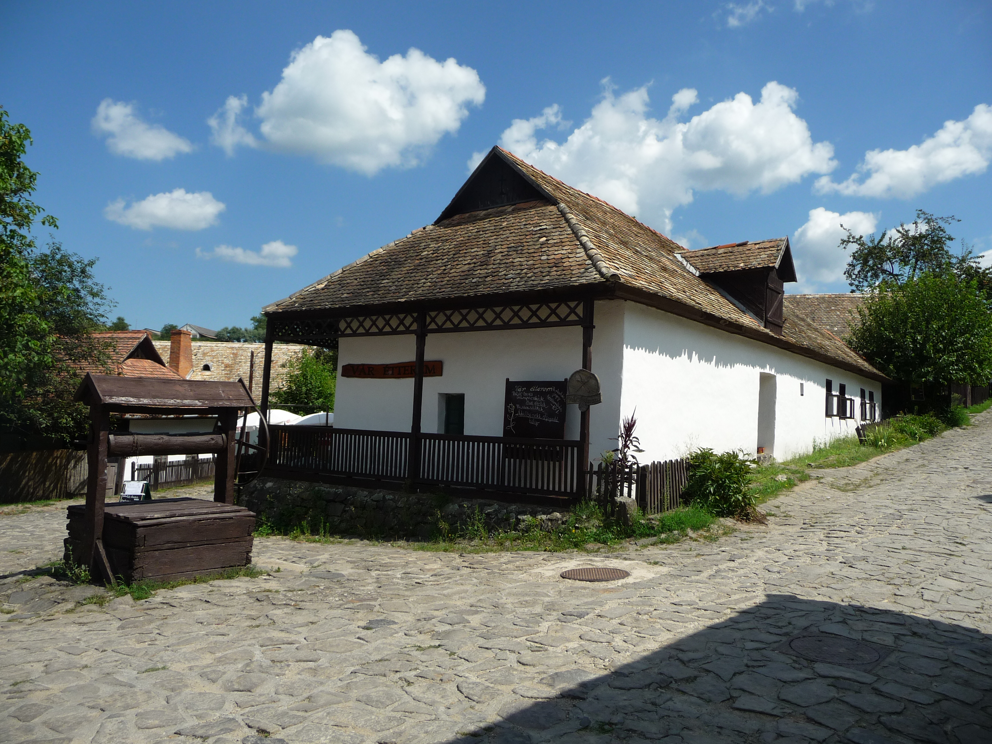 Hollókő, Kossuth u. 93–95.